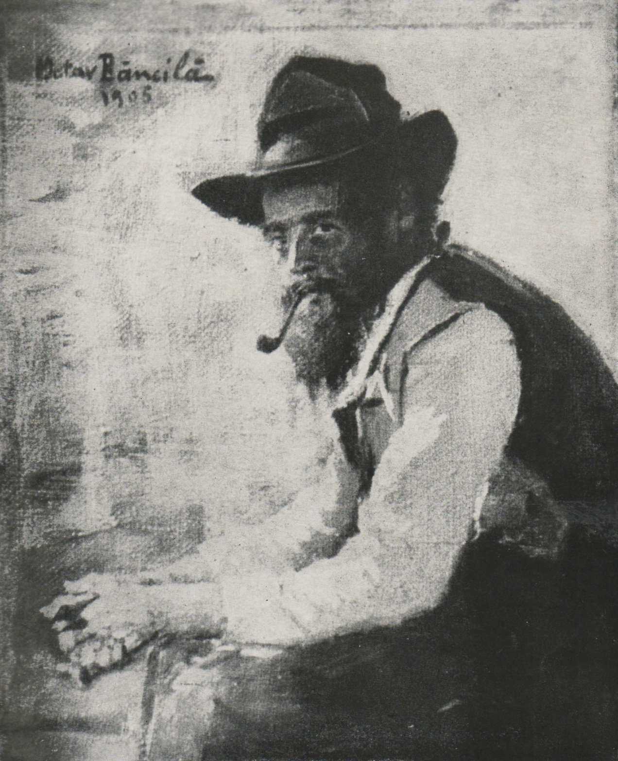 Muncitor în repaus